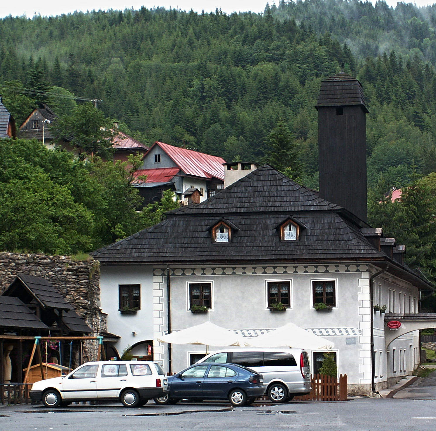 penzión Klopačka, Špania Dolina